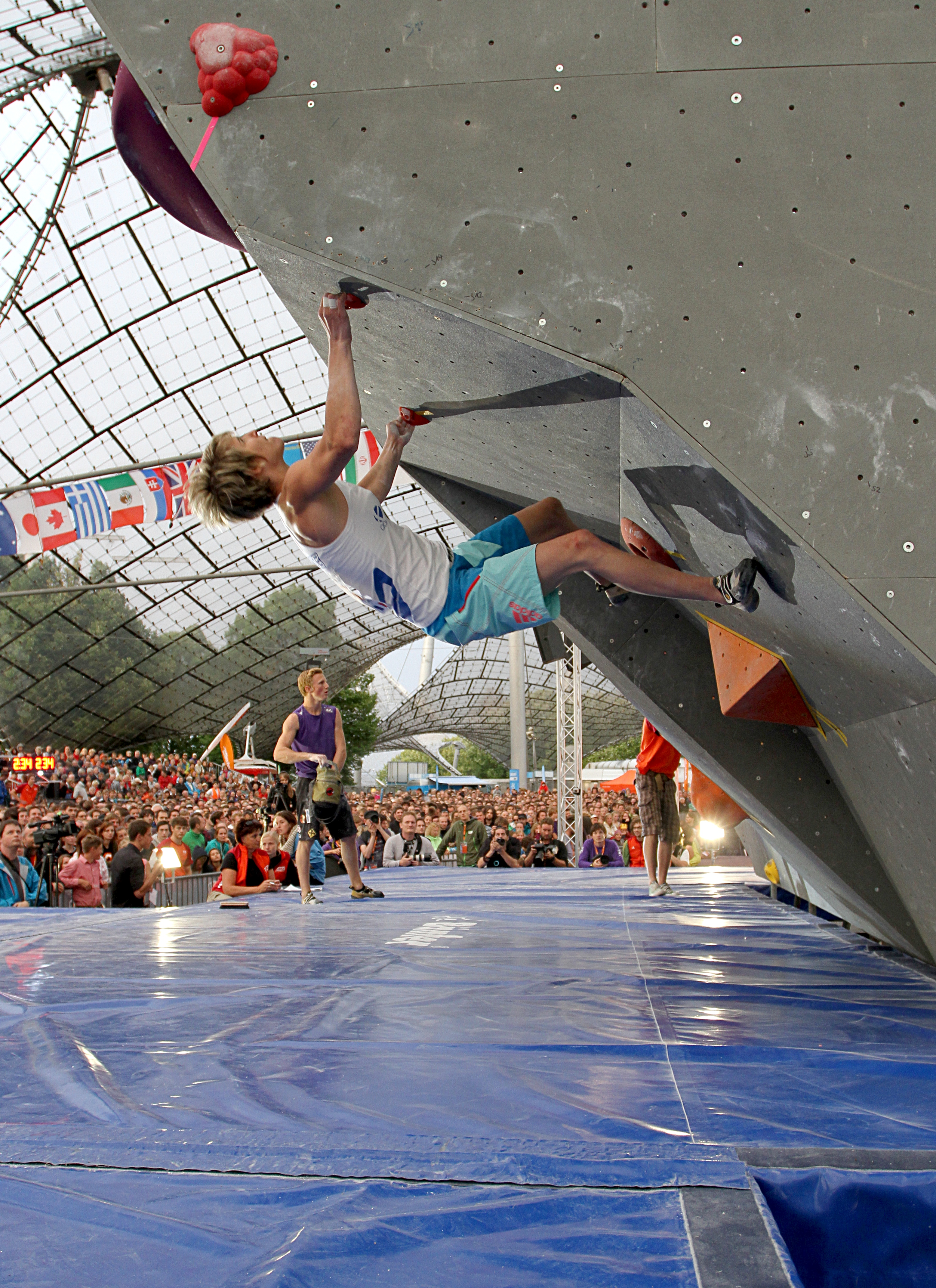 Melanie Sandoz, FRA, Jakob Schubert AUS in the background